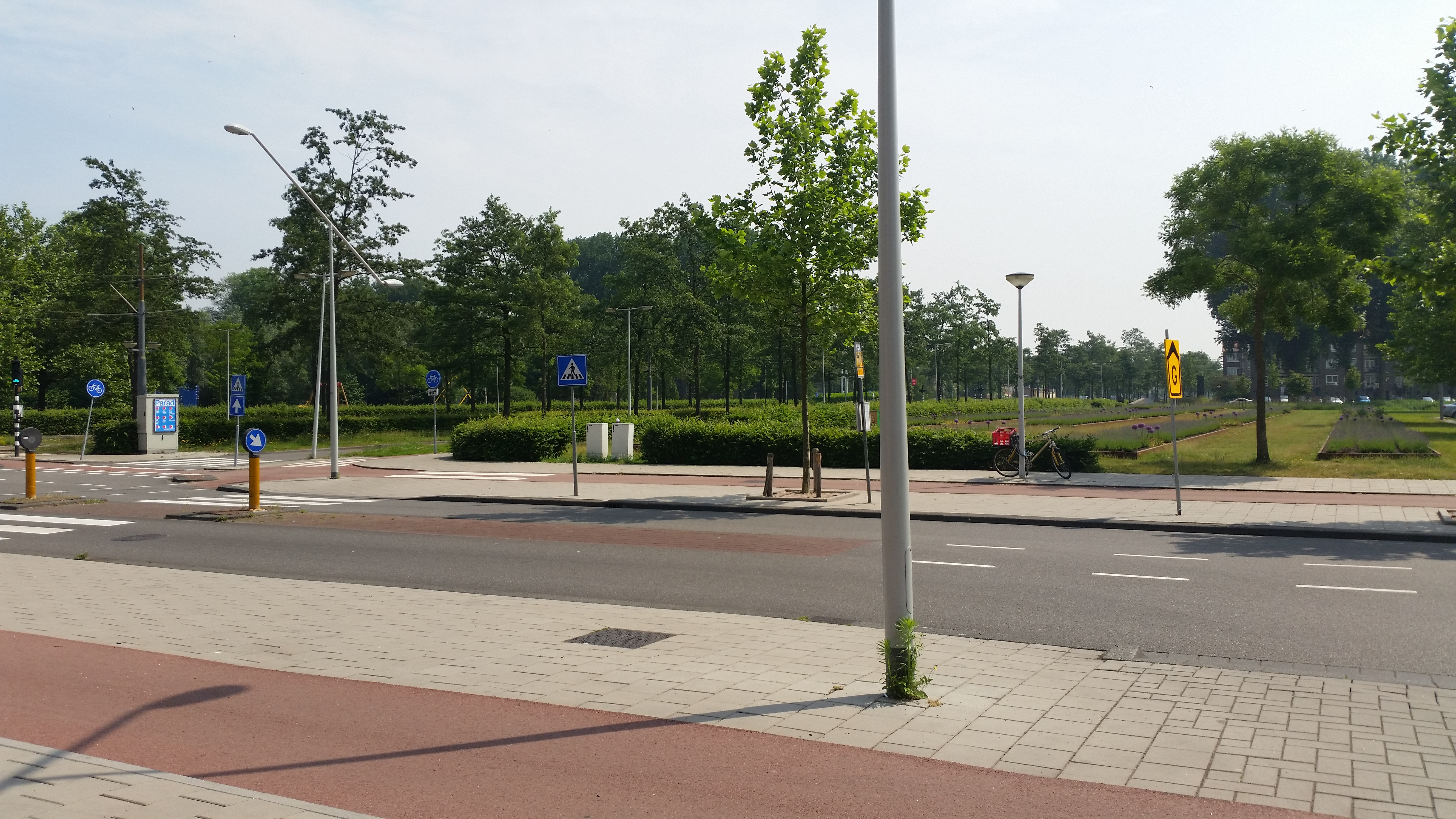 Foto waar ooit Brug 650 stond, tot 2001 een ongelijkvloerse kruising in de Burgemeester Roellstraat en Dr. H. Colijnstraat, Amsterdam. Er kwam toen een gelijkvloerse kruising, maar de plek zelf bleef onbebouwd